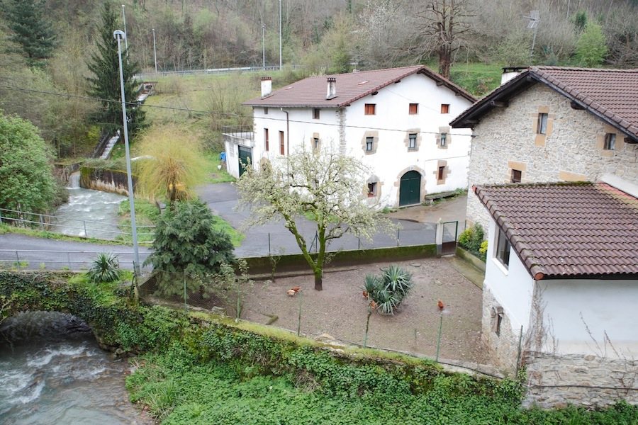 Zaldibarko Eitzaga auzoa